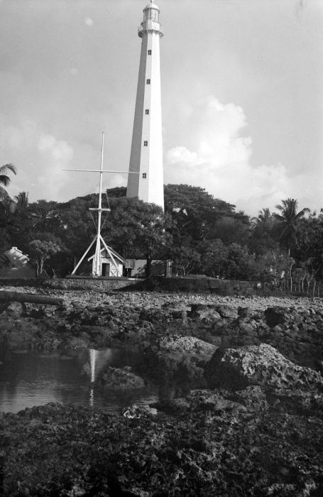 Repronegatief. Anjer, vuurtoren